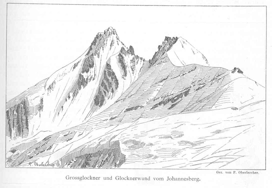 Großglockner und Glocknerwand von Nordwesten